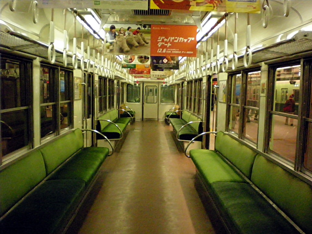 リニューアル後の車内